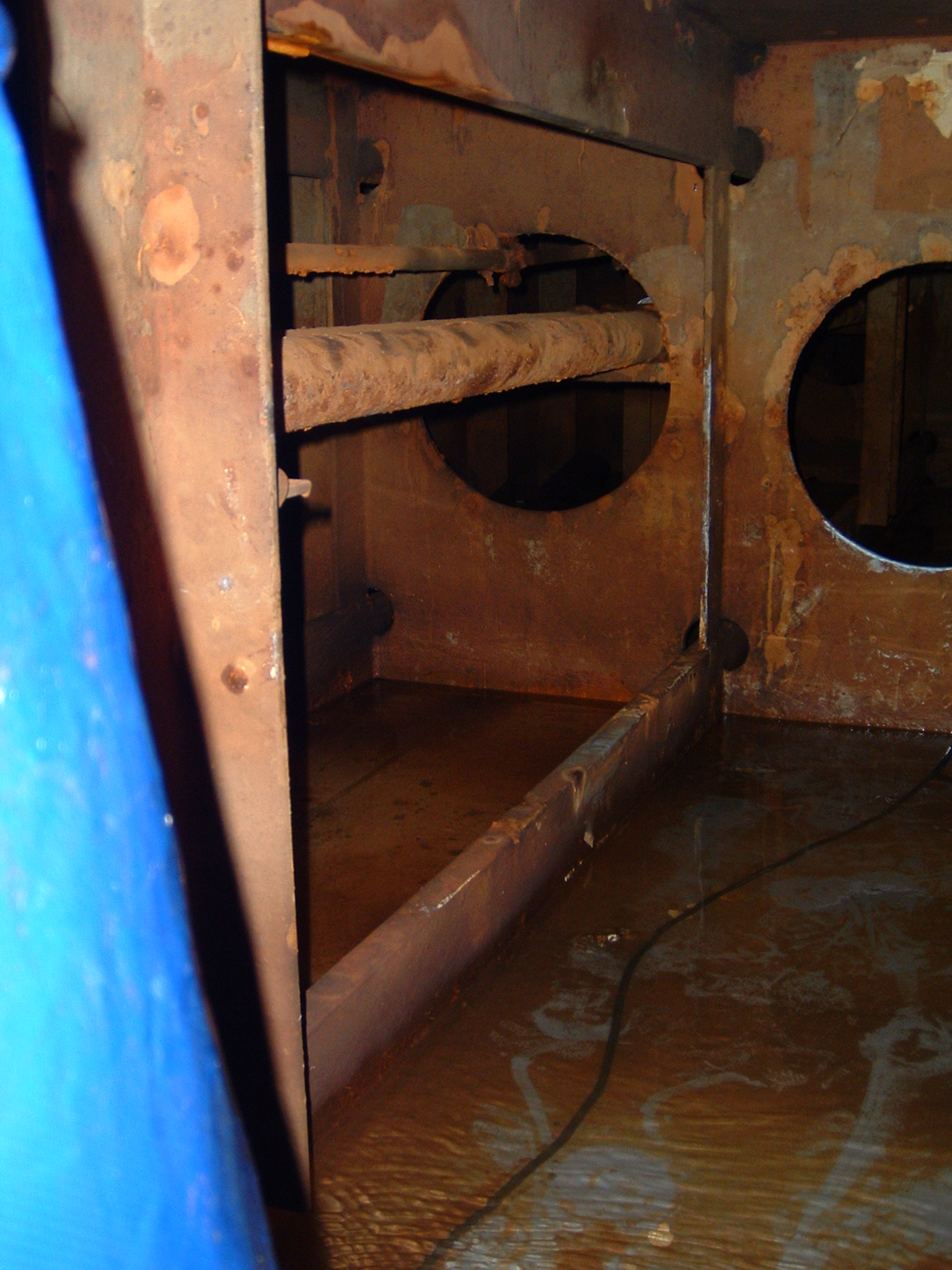 Double bottom tank on a merchant vessel. seen from aft to forward. Capacité de double fond sur un navire de commerce . Vue de l'arrière vers l'avant.